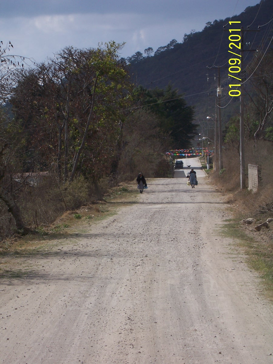 Mujeres caminando en la calle en San Juan Achiutla, Oaxaca, México.